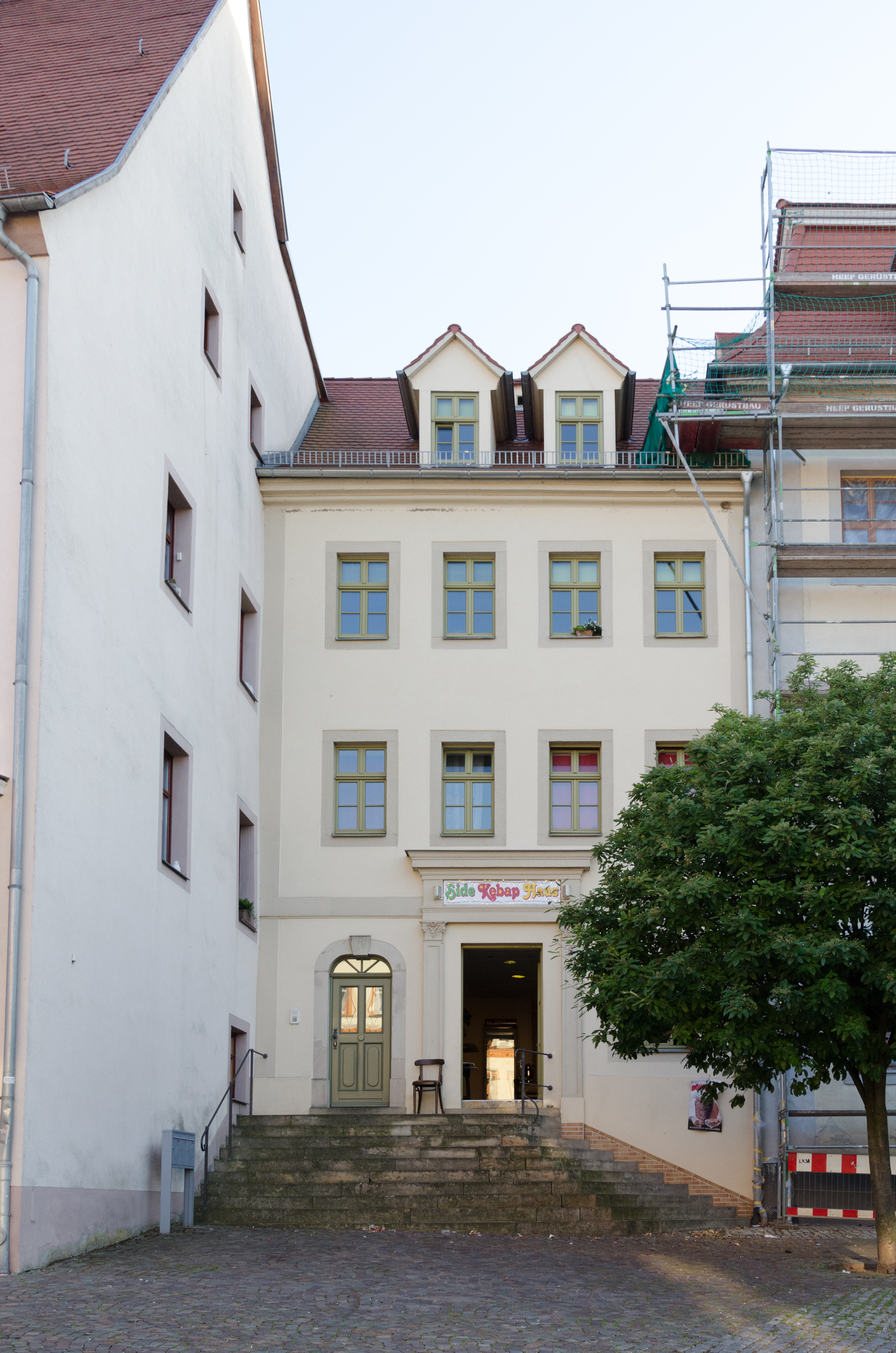 Querfurt, Markt 7